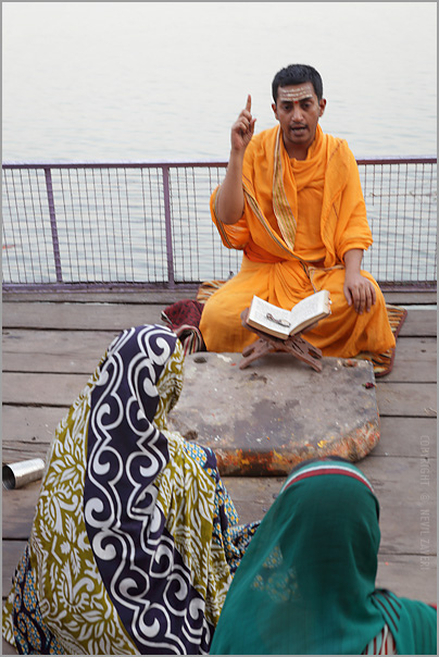 Brahmin reading texts along river Ganga Varanasi India